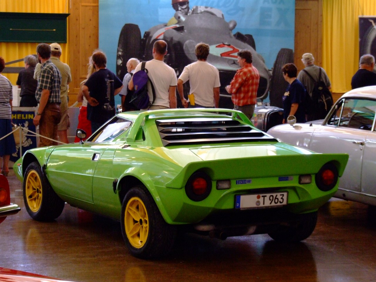 Lancia Stratos HF 2400ccm 195 PS 1978